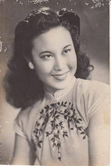 актриса Ли Лихуа